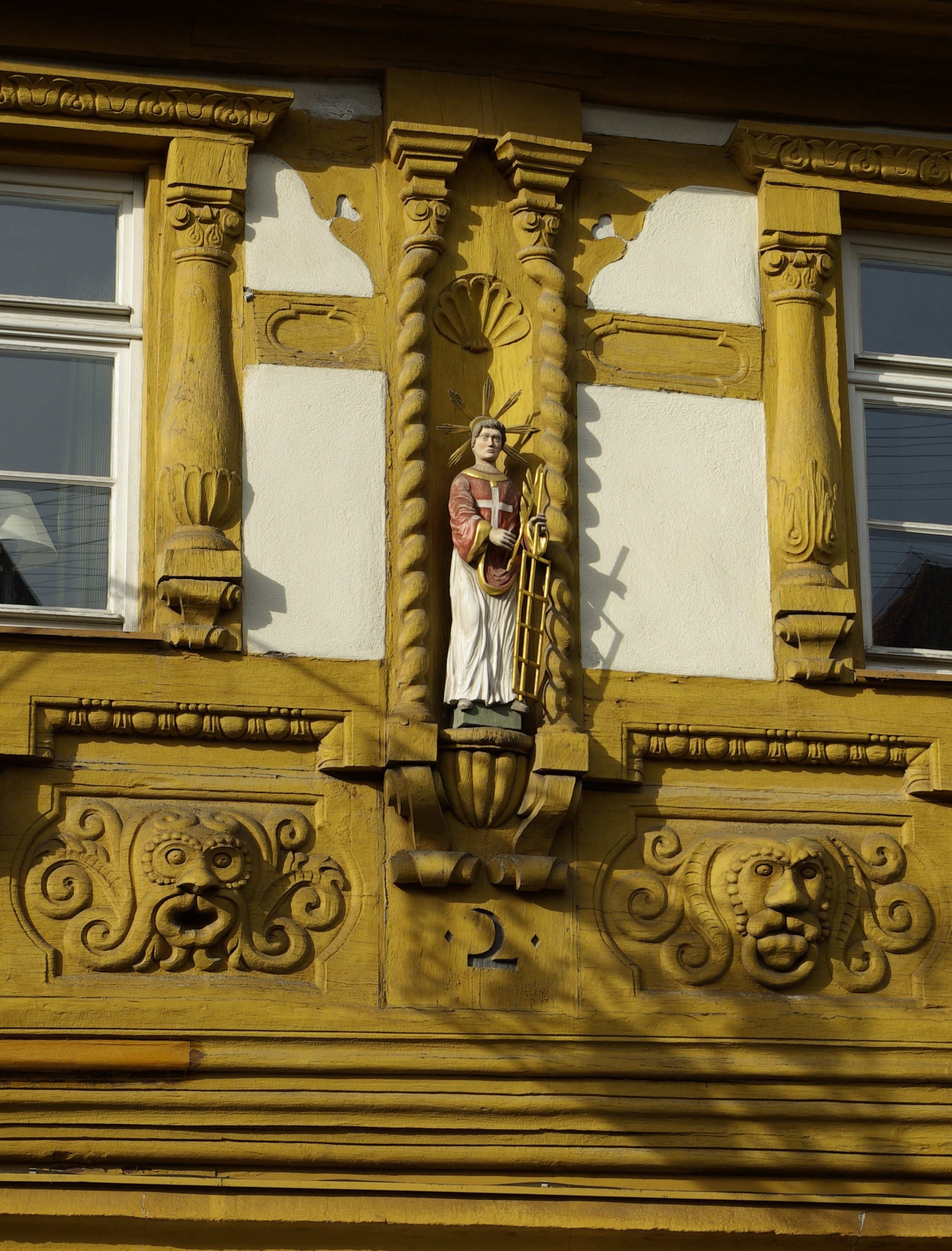 Figur des hl. Laurentius, Schutzpatron der Bierbrauer, am Dillighaus (ehemaliges Zunfthaus der Brauer) in Scheßlitz.